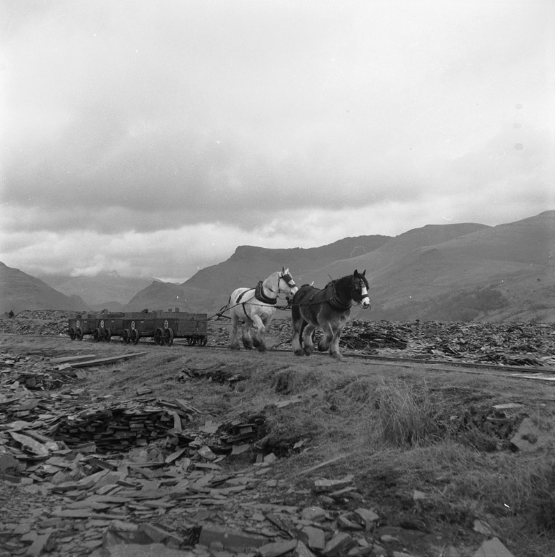 Teitl Cymraeg/Welsh title: Rheilffordd ceffyl yn Nyffryn Nantlle cyn iddo gau yn 1959 Cyfrwng/Medium: Negydd ffilm / Film negative Cyfeiriad/Reference: (gch18793) Rhif cofnod / Record no.: 3370751 Rhagor o wybodaeth am gasgliad Geoff Charles yn Llyfrgell Genedlaethol Cymru More information about the Geoff Charles Collection at the National Library of Wales Mae ffotograffau Geoff Charles hefyd yn rhan o Broject Europeana Libraries Geoff Charles' photographs also form part of the Europeana Libraries Project